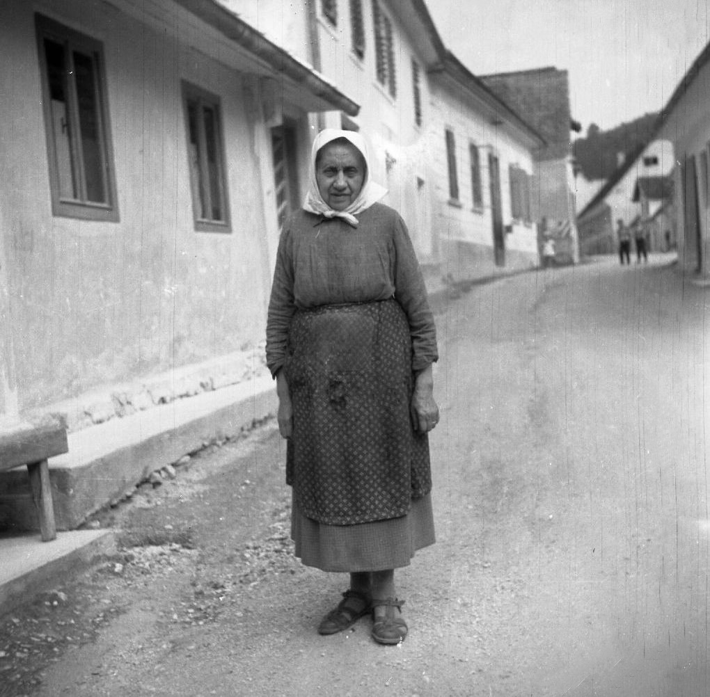 Praznična noša, Vitanje, Kotnik Julijana z doma izdelano adrco.